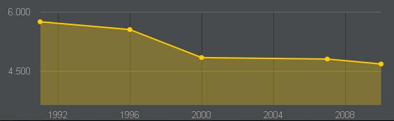 populaçao